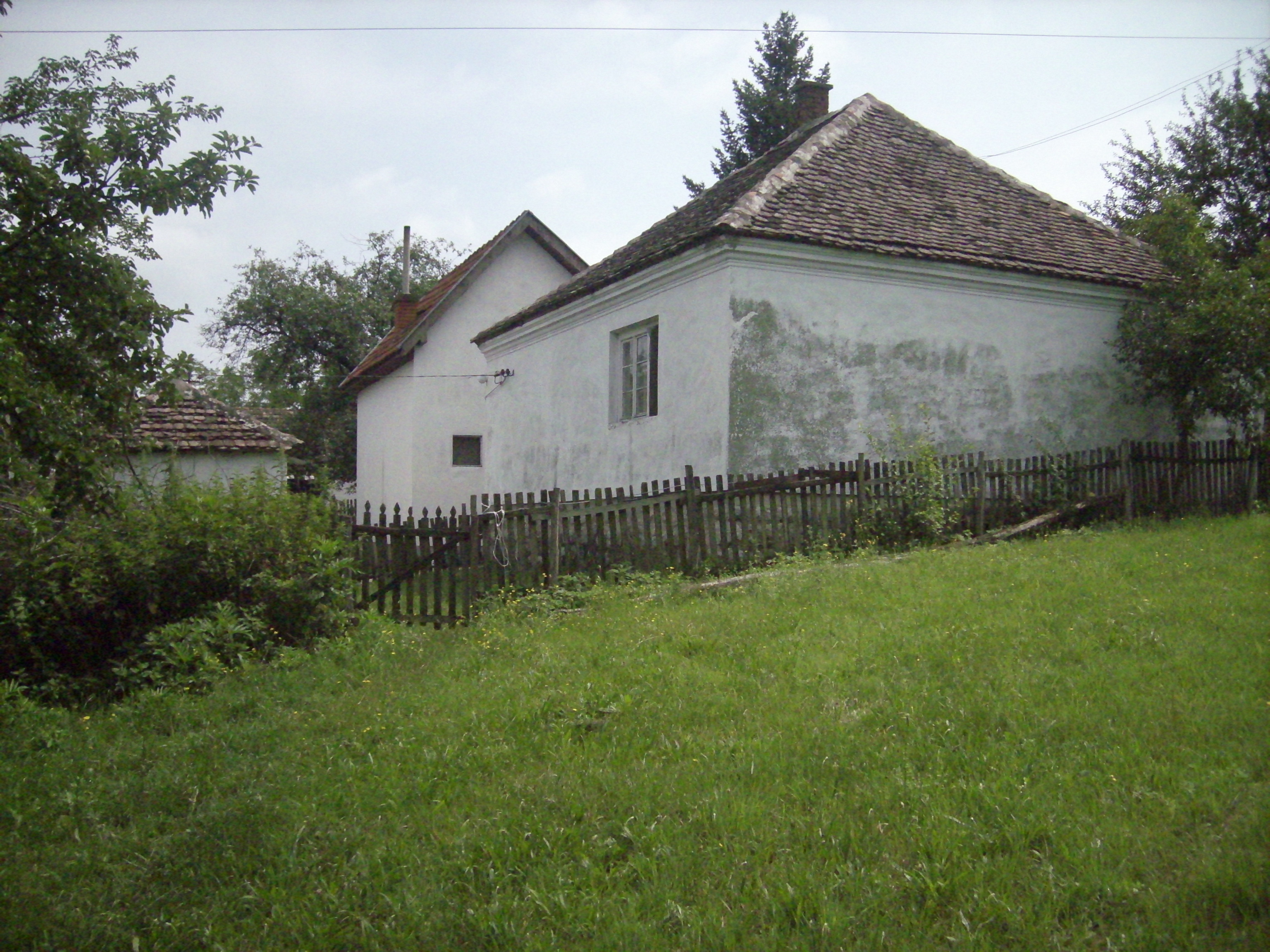 A House